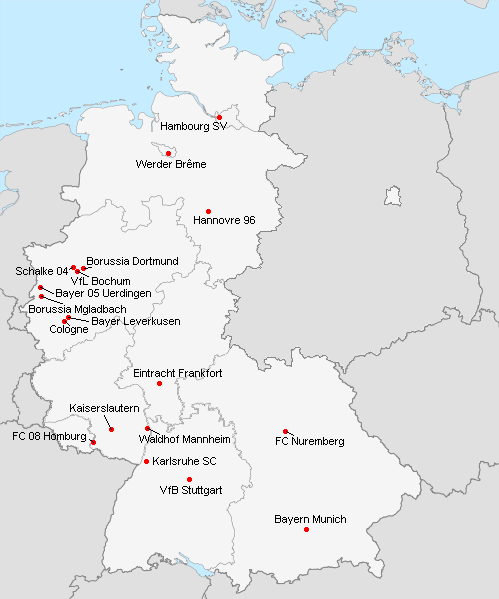 Répartition des clubs en 1.Bundesliga 1987-1988.